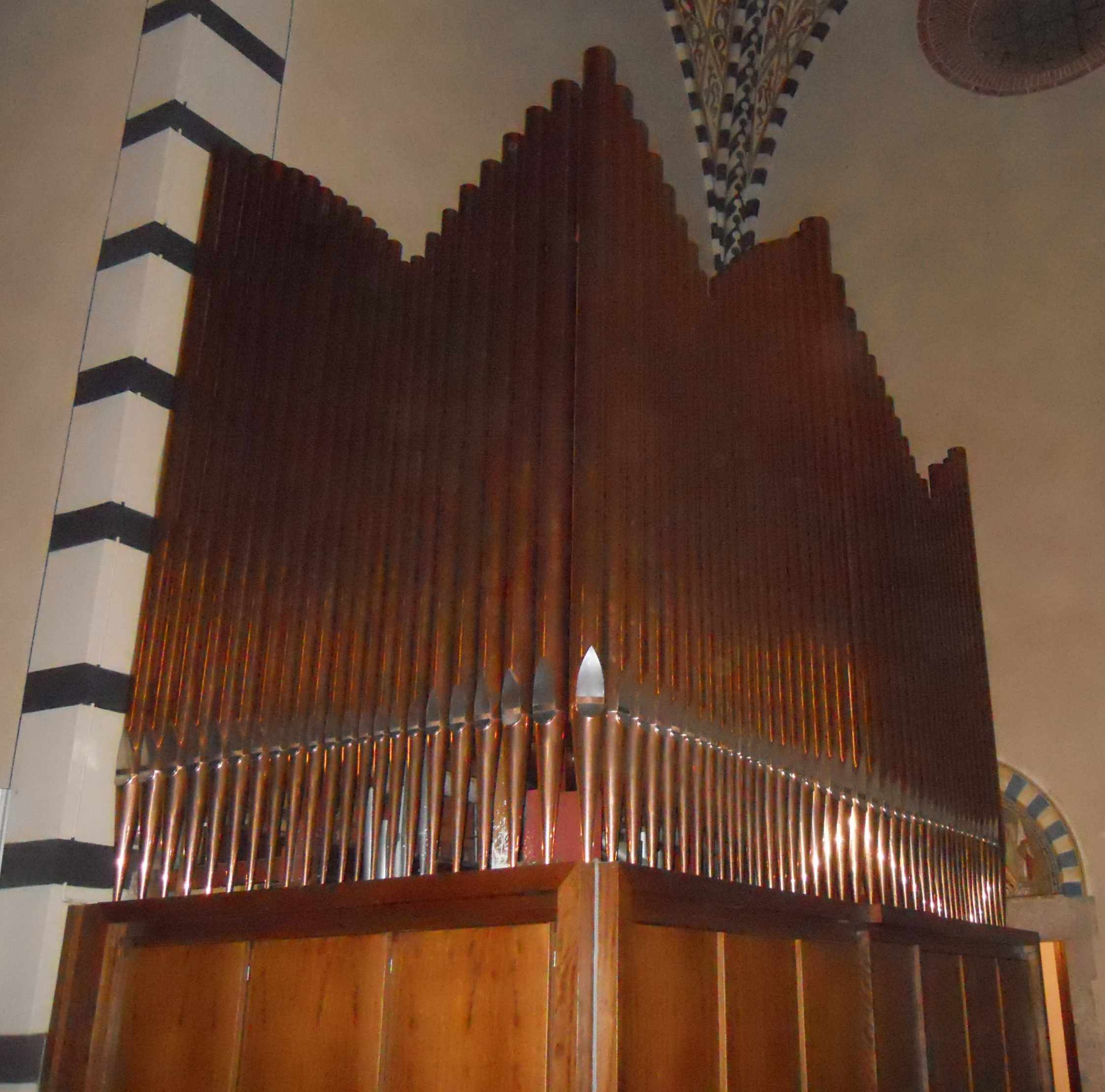 L'organo Fratelli Marin (II+P/27) della chiesa di Santa Caterina d'Alessandria a Pisa, già nel duomo della città.